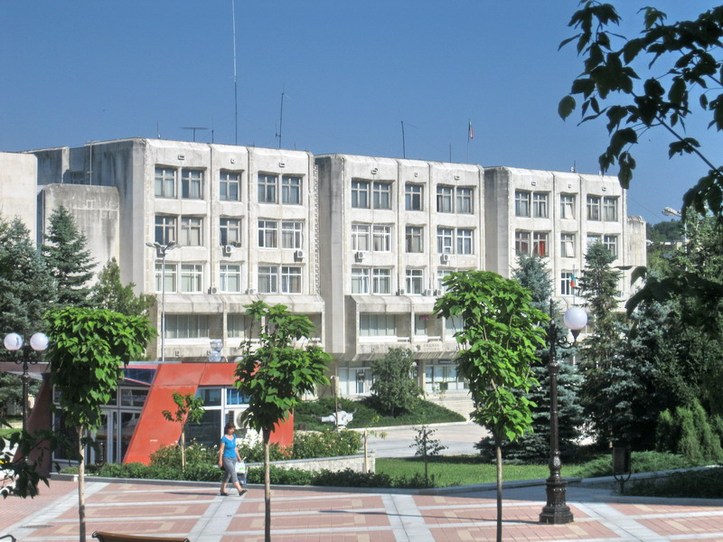 Сградата на администрацията на Община Попово на пл. "Ал. Стамболийски" - 21.06.2012